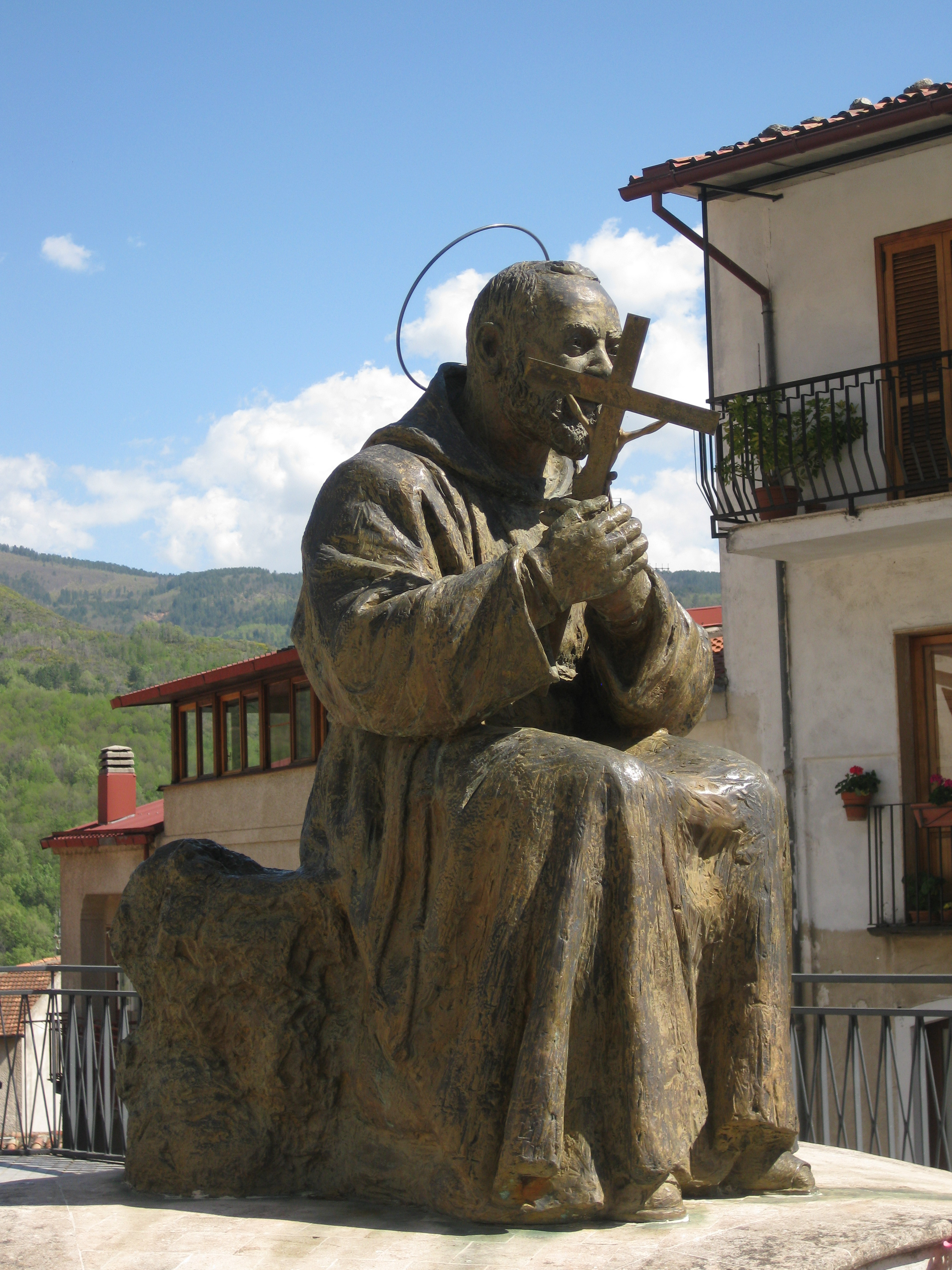 Statua di Padre Pio in bronzo